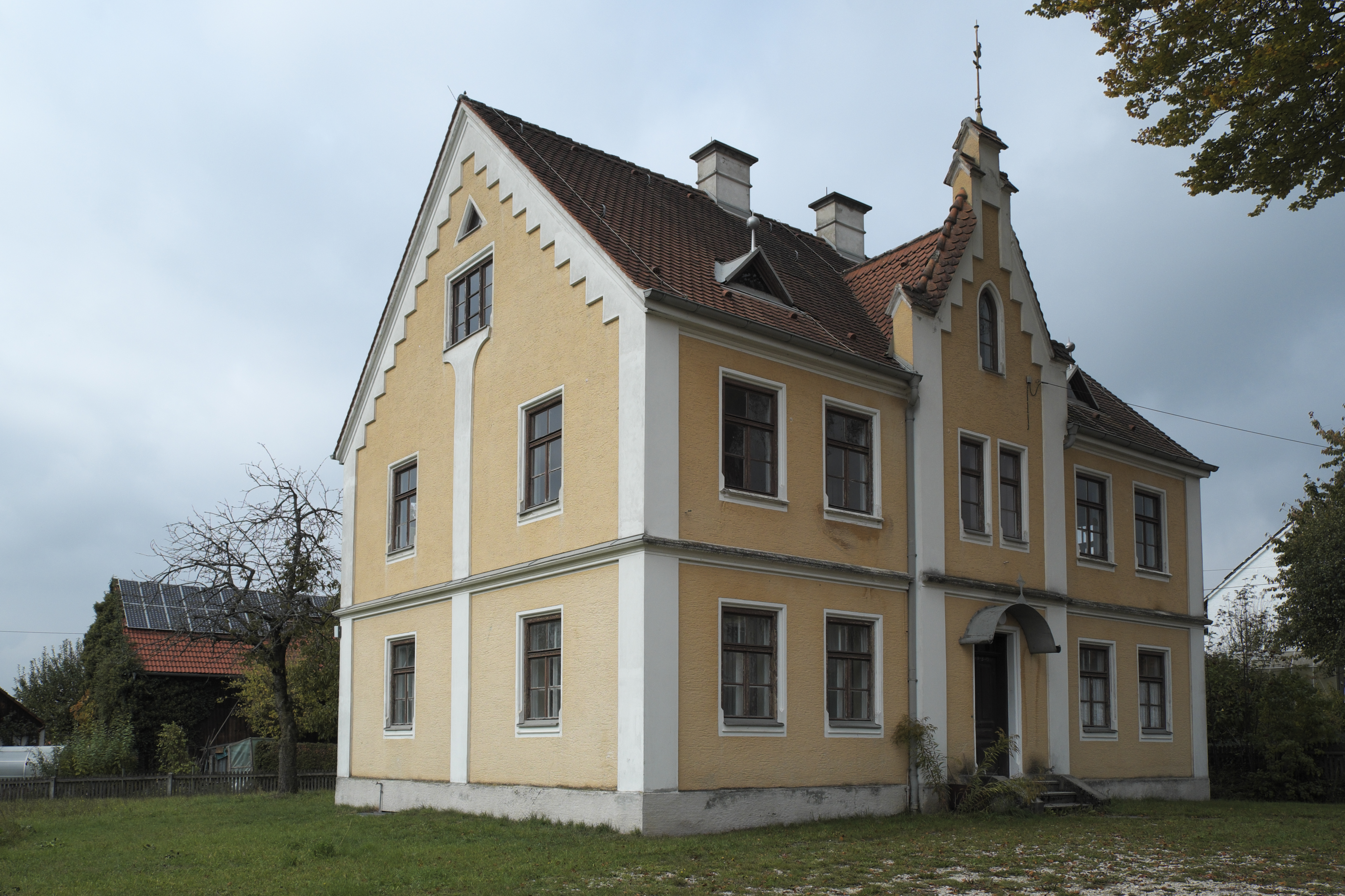 Pfarrhaus neben der katholischen Pfarrkirche St. Stephan in Hohenzell (Altomünster) im Landkreis Dachau (Bayern/Deutschland)